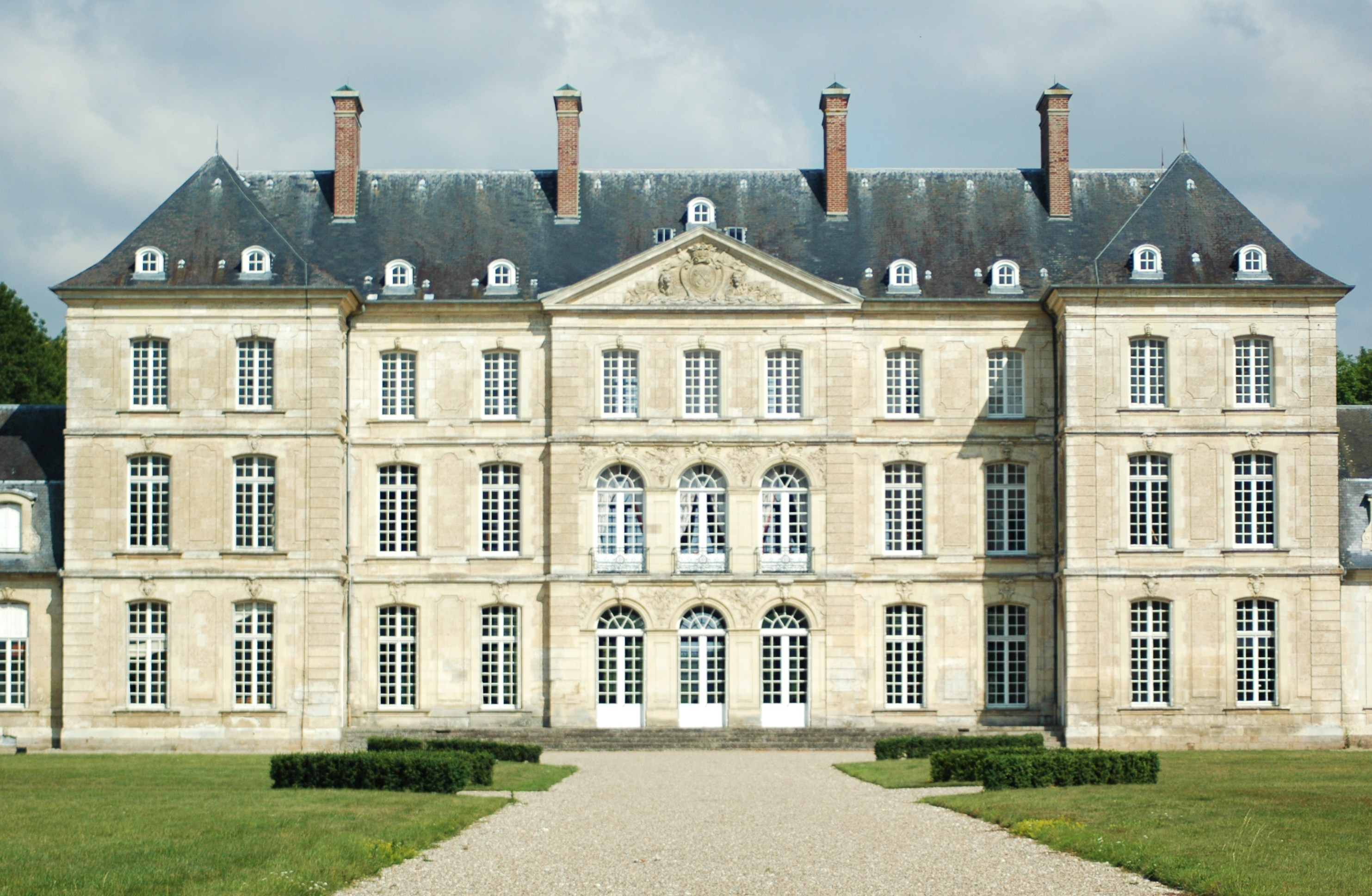 Le château de Bertangles, Somme, France